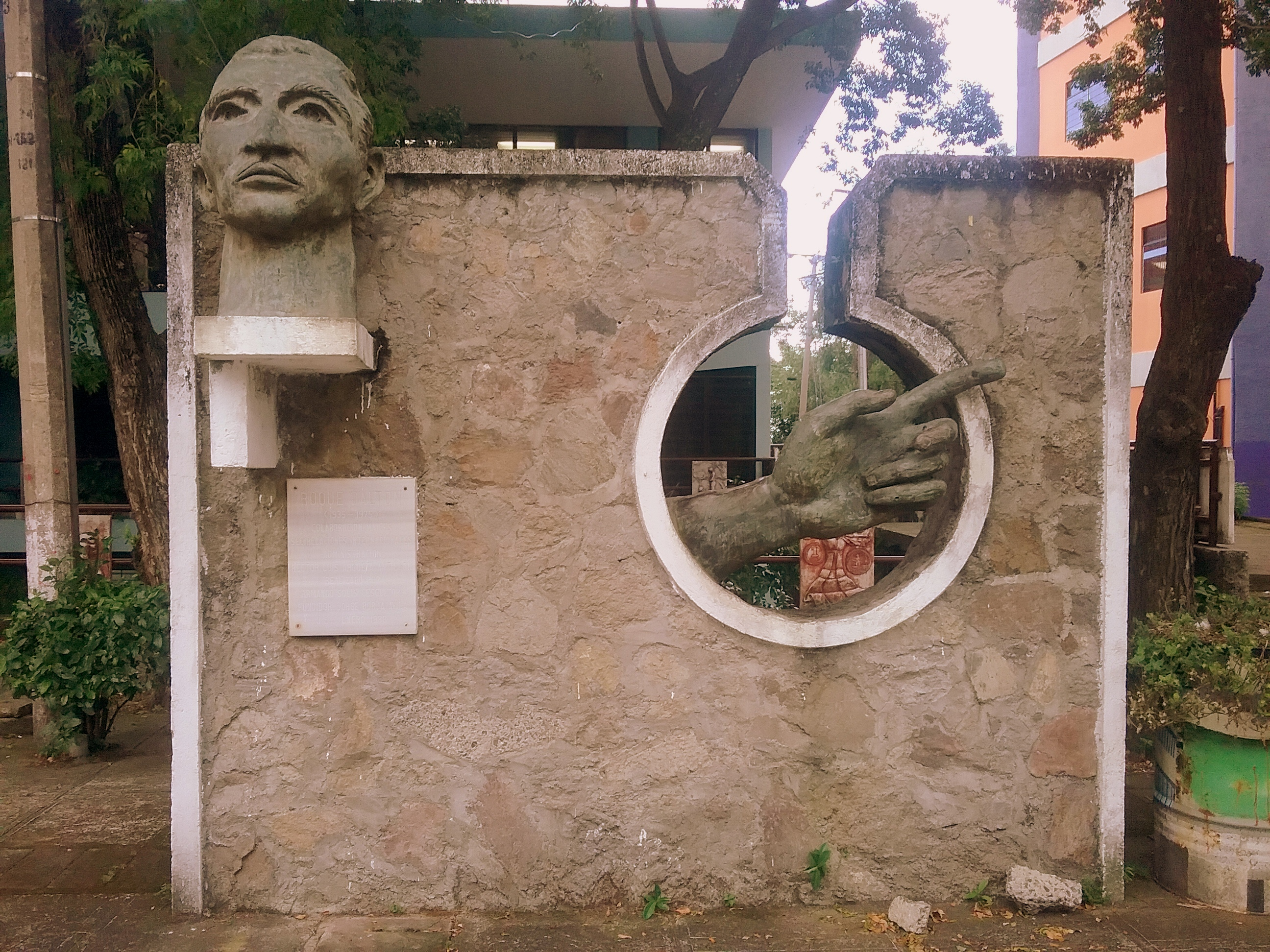 Monumento al periodista Roque Dalton García, en la plaza de la Cultura de la Facultad de Ciencias y Humanidades de la Universidad de El Salvador.